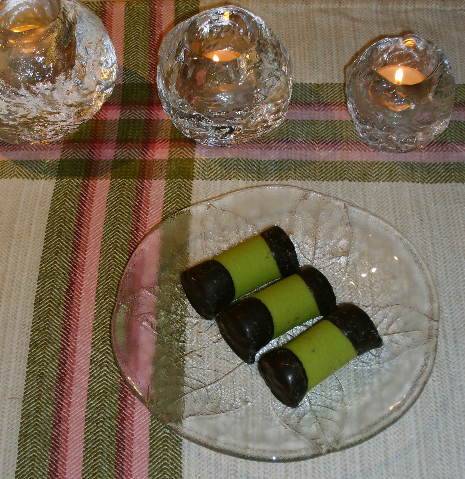 Dammsugare